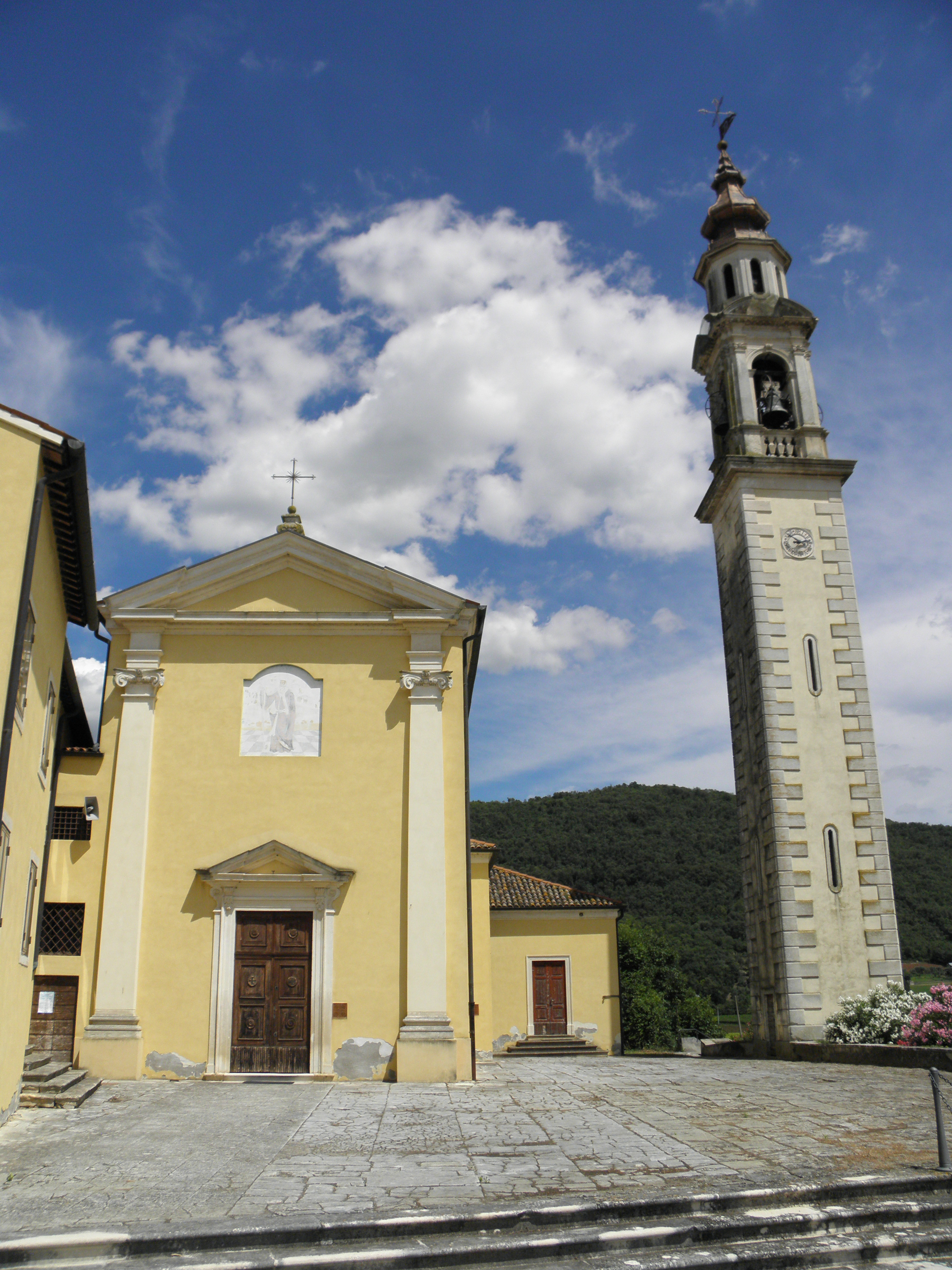 San Germano dei Berici, già comune autonomo e ora frazione di Val Liona: la chiesa parrocchiale di San Germano.